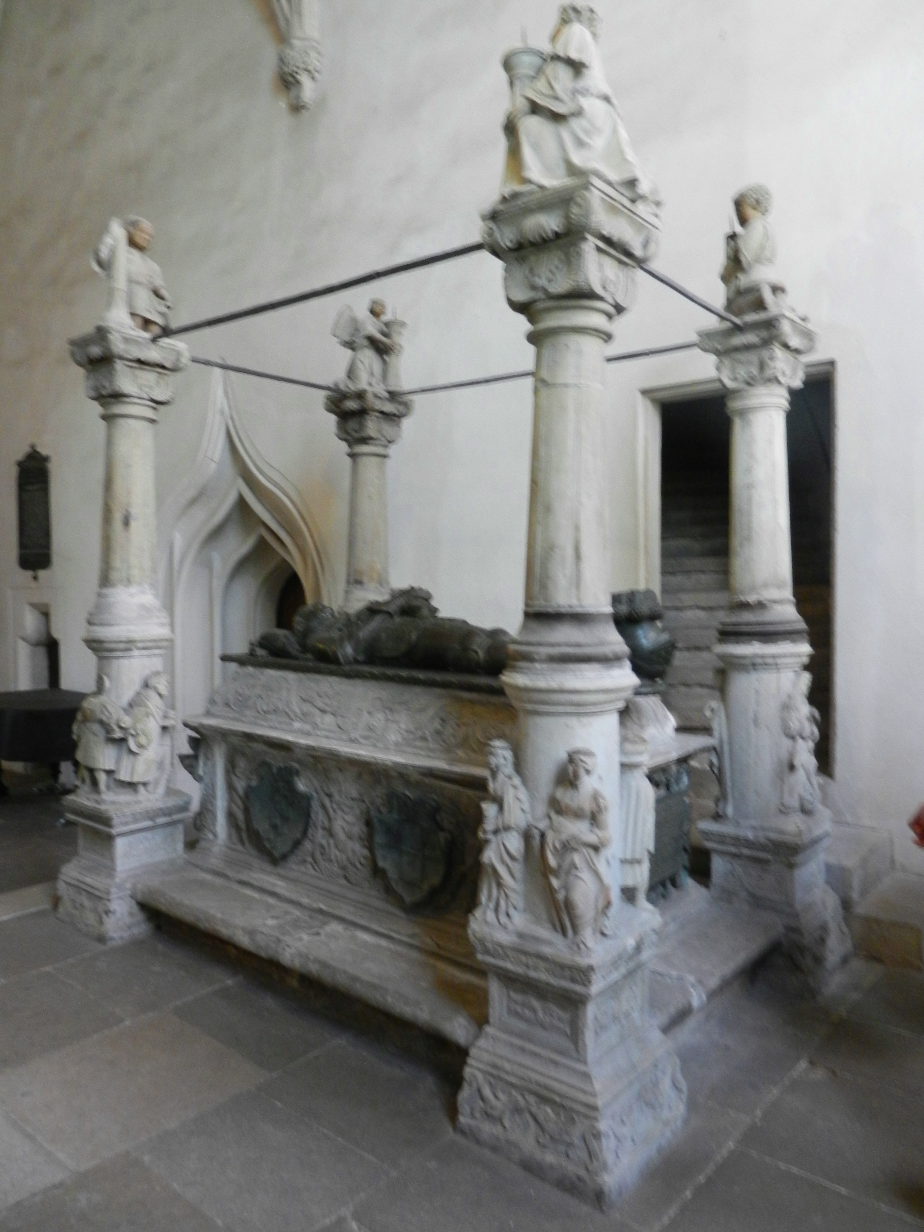 Eisleben, St.-Andreas-Kirche, Grabmonument Graf Hoyer VI.